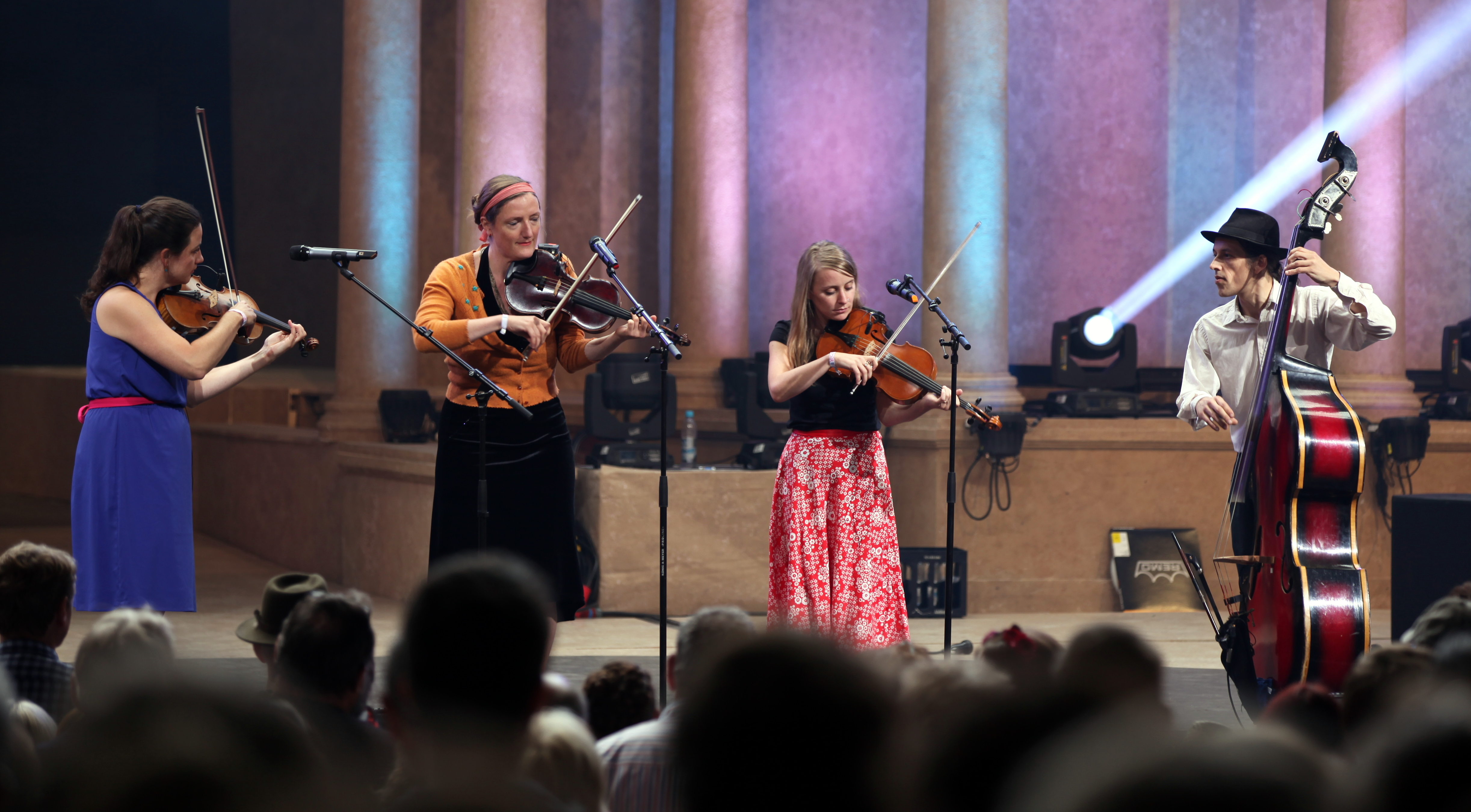 Zwirbeldirn auf dem Heimatsound-Festival 2015 Von links: Maria Hafner Beatrix Klöckner Evi Keglmaier Simon Ackermann